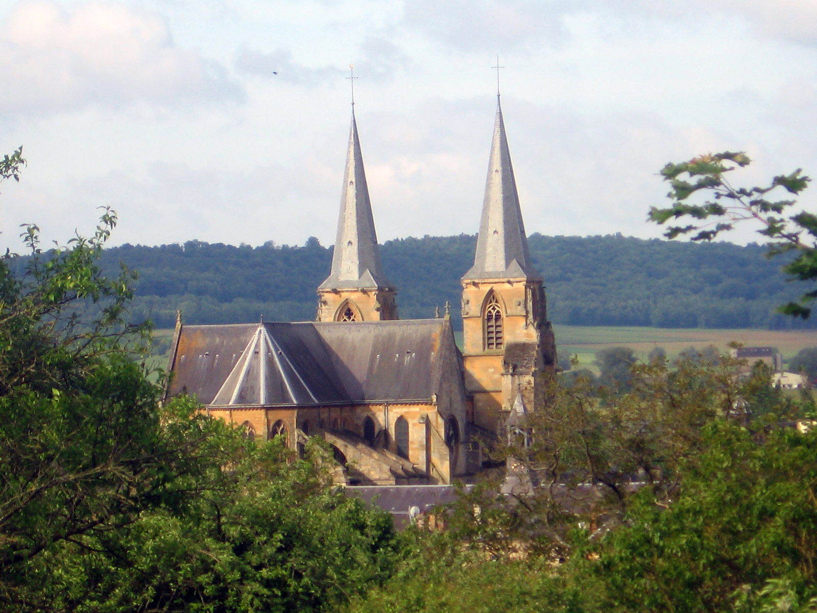 Abteikierch vu Mouzon, franséisch Ardennen.